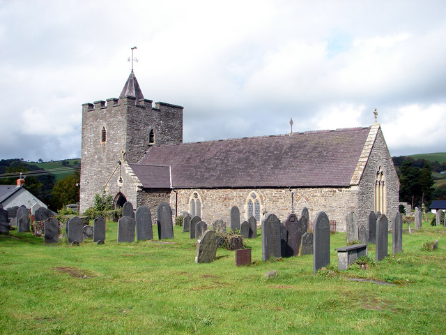 Eglwys S. Ilar, Llanilar